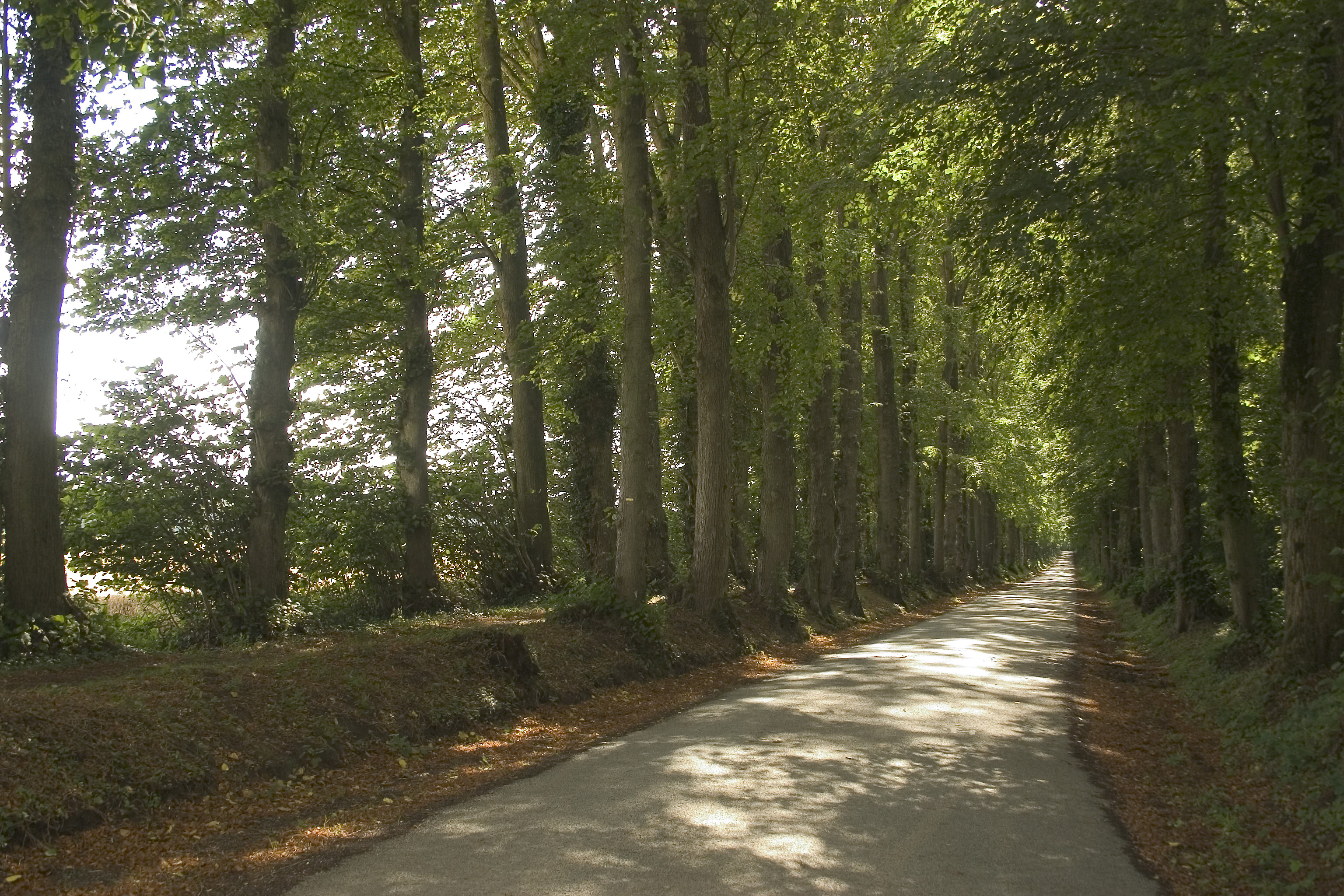 L'allée des tilleuls releiant les châteaux de Givenchy-le-noble et Lignereuil